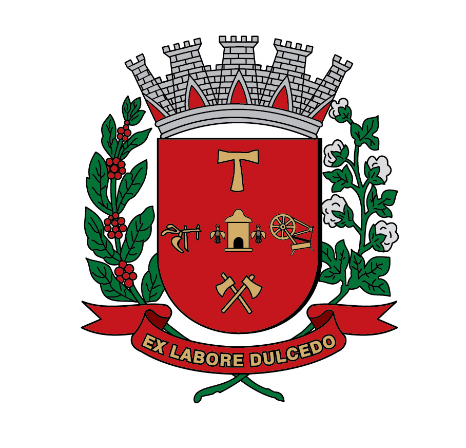 Brasão do Município de Americana-SP